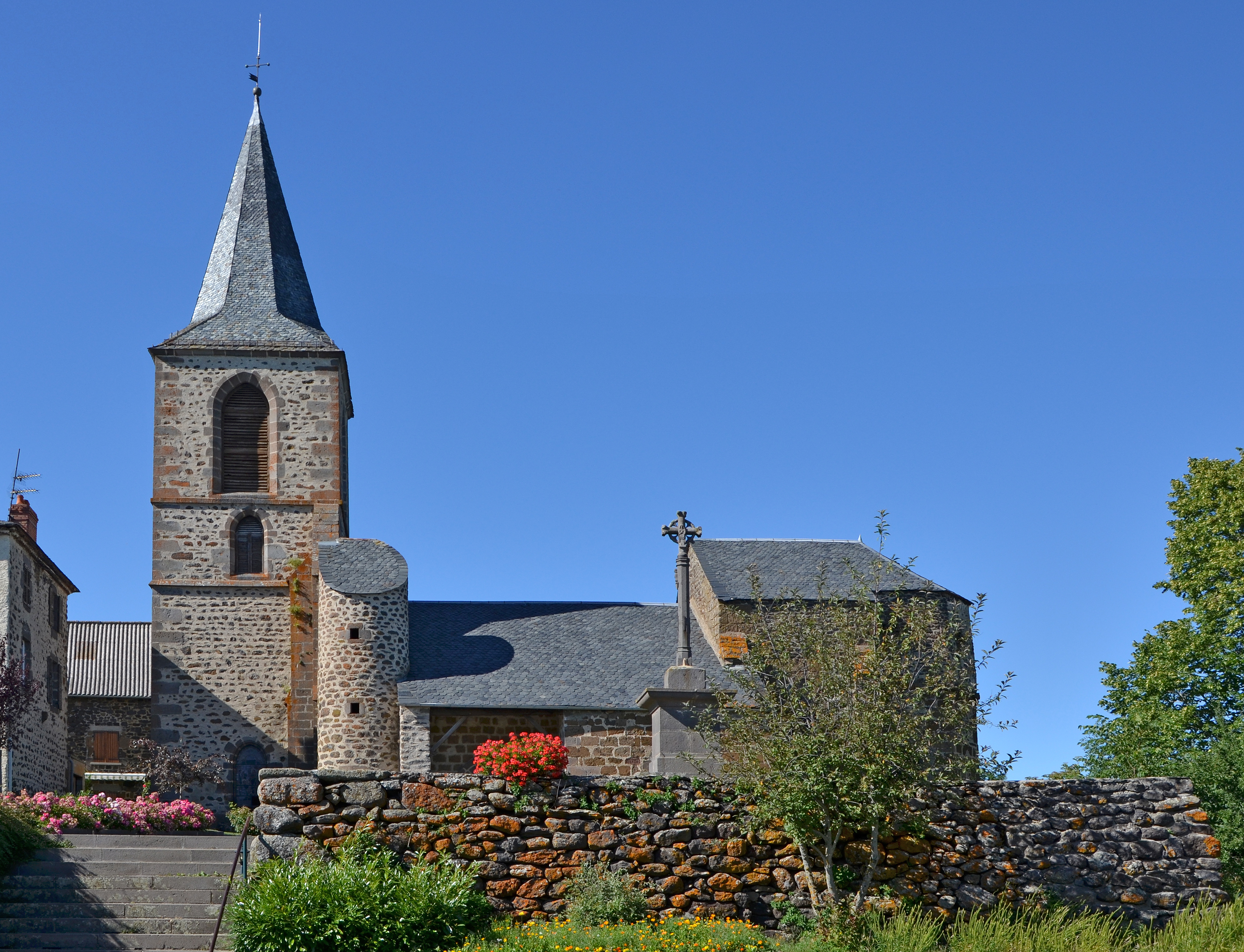 Eglise de Coltines, Cantal, France .